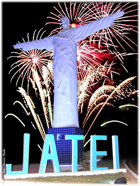 Cristo na entrada da cidade